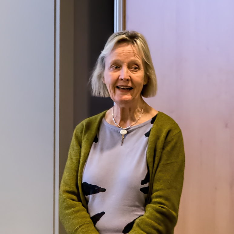 14. februar 2016